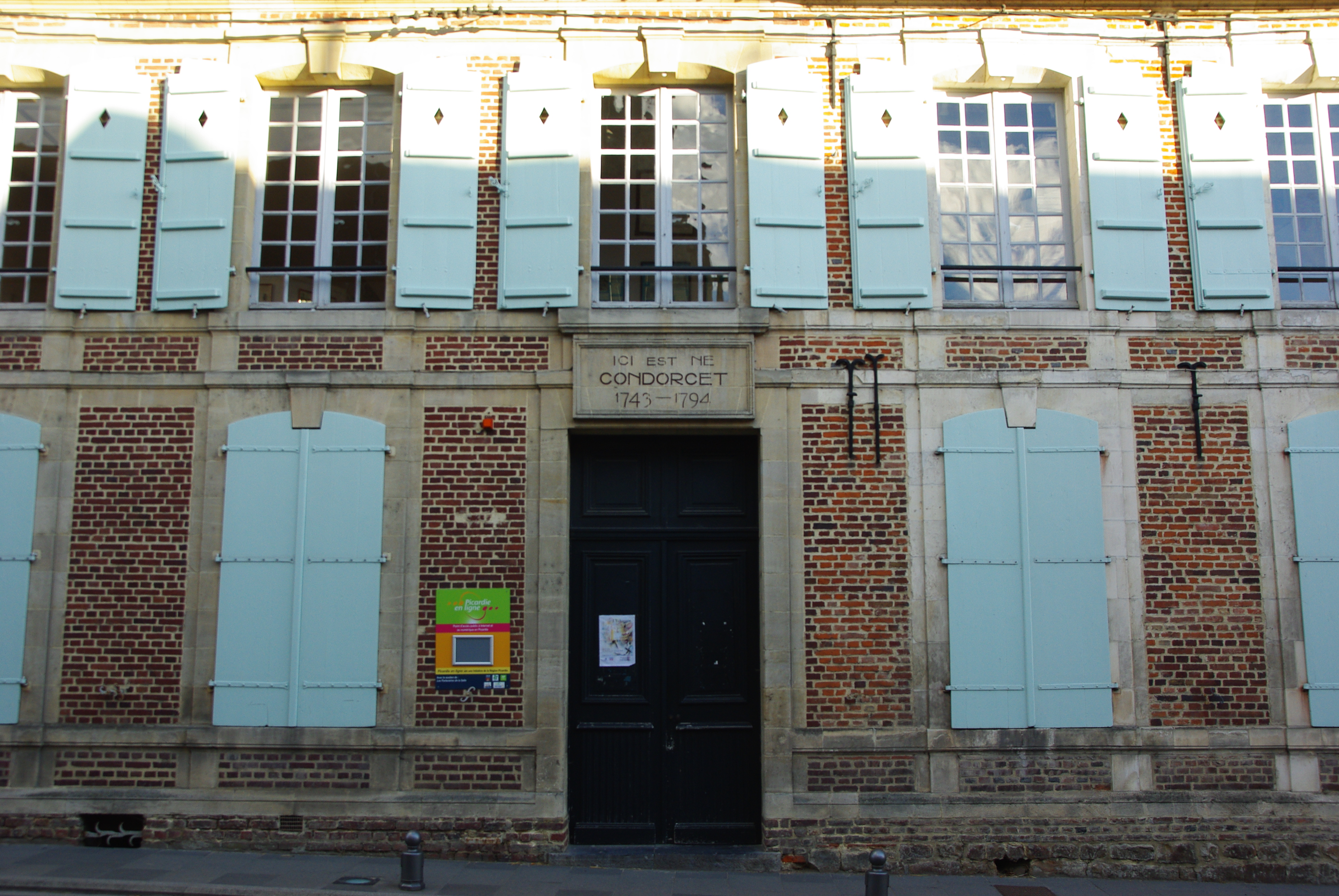 Maison natale du mathématicien et philosophe Marie-Jean-Antoine-Nicolas de Caritat de Condorcet (1743-1794) issu d'une très ancienne famille de la noblesse dauphinoise dont le père avait reçu le bourg de Ribemont comme garnison d'affectation. Modeste intérêt architectural, mais valeur historique exceptionnelle. Condorcet est né et a séjourné régulièrement en cette maison jusqu'en 1775, y a probablement reçu Turgot et d'Alembert. Vers 1880, la maison est devenue la propriété du romancier naturaliste Léon Hennique (1850-1935) qui y accueillit, entre autres écrivains illustres de l'époque Émile Zola et Alphonse Daudet. Cependant, cette sobre demeure brique et pierre a été en partie détruite pendant la Première Guerre mondiale et a perdu au cours de celle-ci la totalité de ses décors intérieurs et de son mobilier 18e siècle, encore en place avant 1914. En outre, la maison a subi, depuis la dernière guerre une longue période d'abandon, ce qui explique l'état de délabrement actuel de l'édifice et le fait que les intérieurs aient été totalement dénaturés. .